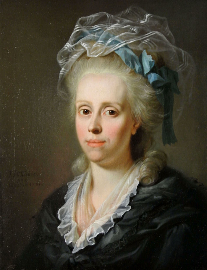 "Frau de Boor" - Porträt der Malerin Maria Elisabeth de Boor (1746-1810).